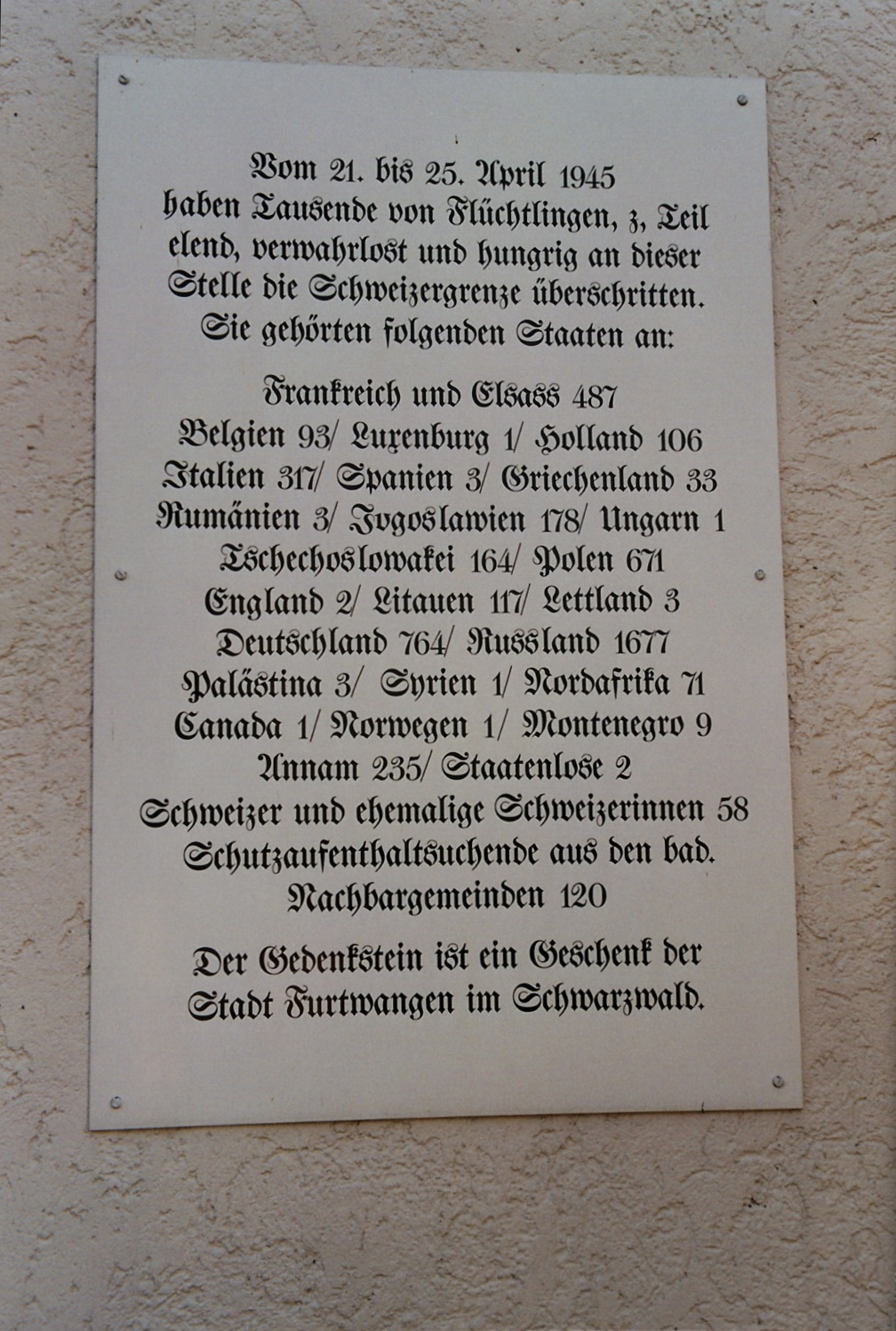 Gedenktafel in Schleitheim (CH) mit Anzahl und Herkunft grenzüberschreitender Flüchtlinge Ende April 1945.